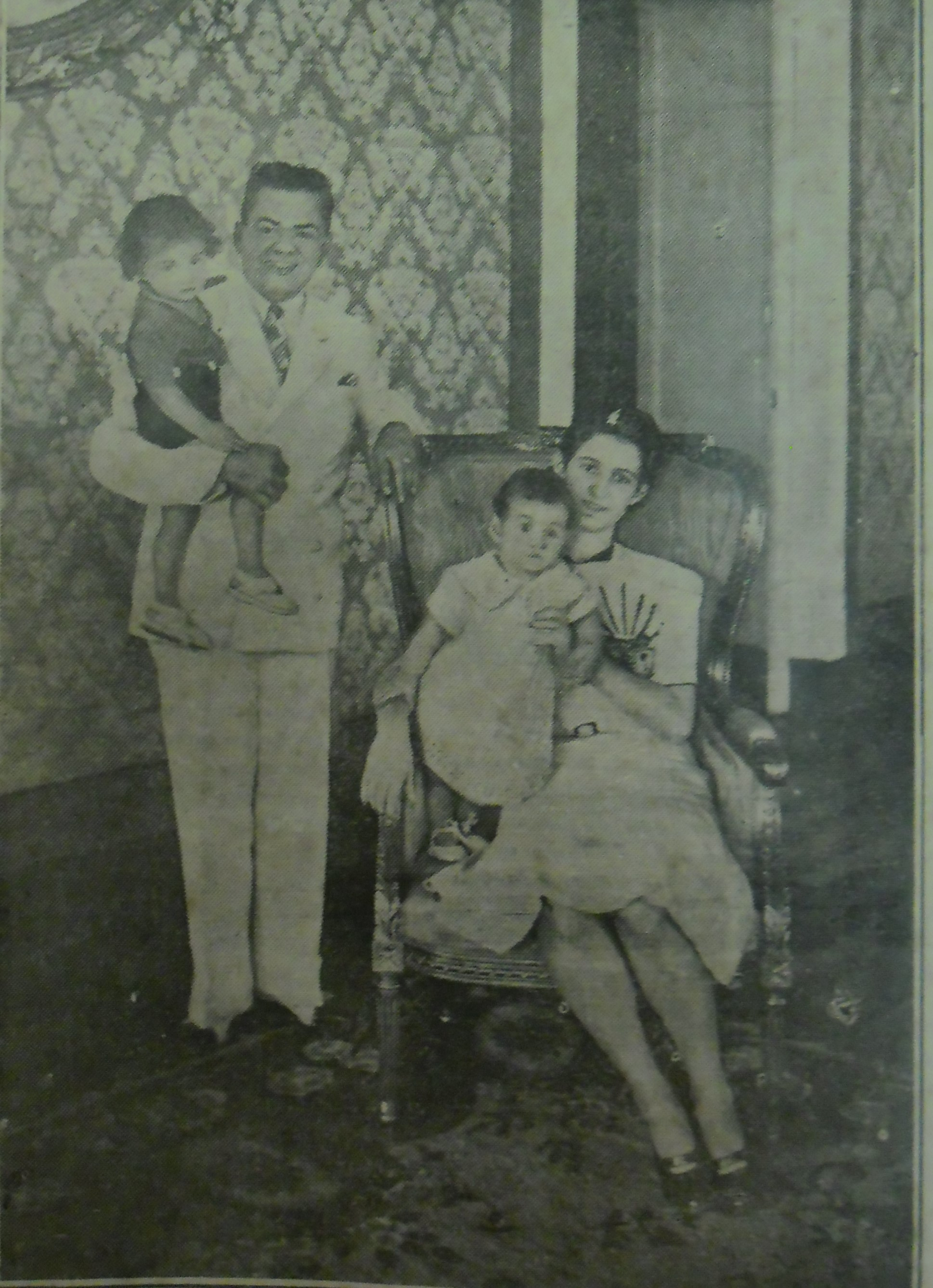 O Interventor maranhense na intimidade. Imagem captada pela Revista Athenas em fevereiro de 1942.